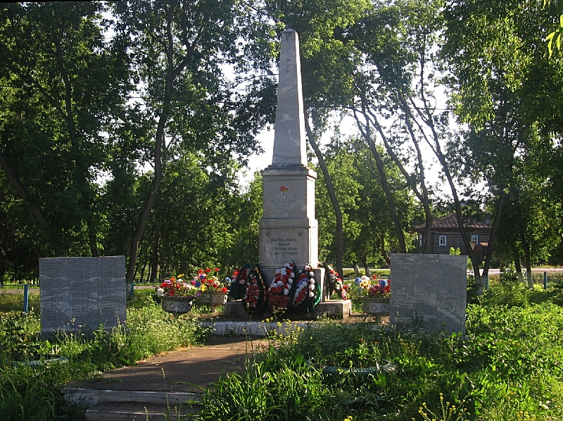 Памятник